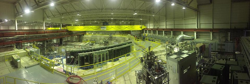 מבט פנימי ממפעל האנטי-חומר בו כיום מייצרים אטומי אנטי-מימן